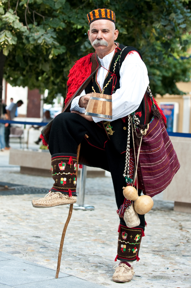 Mirlovačka nošnja, jedna je od inačica nošnje dinarskog područja. Muška se nošnja sastoji od: crvene kape (s hrvatskim pleterom) košulje bijele s ogrcom krožeta s tokama gaća na promaju s nazuvcima (u donjem dijelu) brusa kaparana (kaparan s resama) pasa bijelih vunenih čarapa (tkalci)